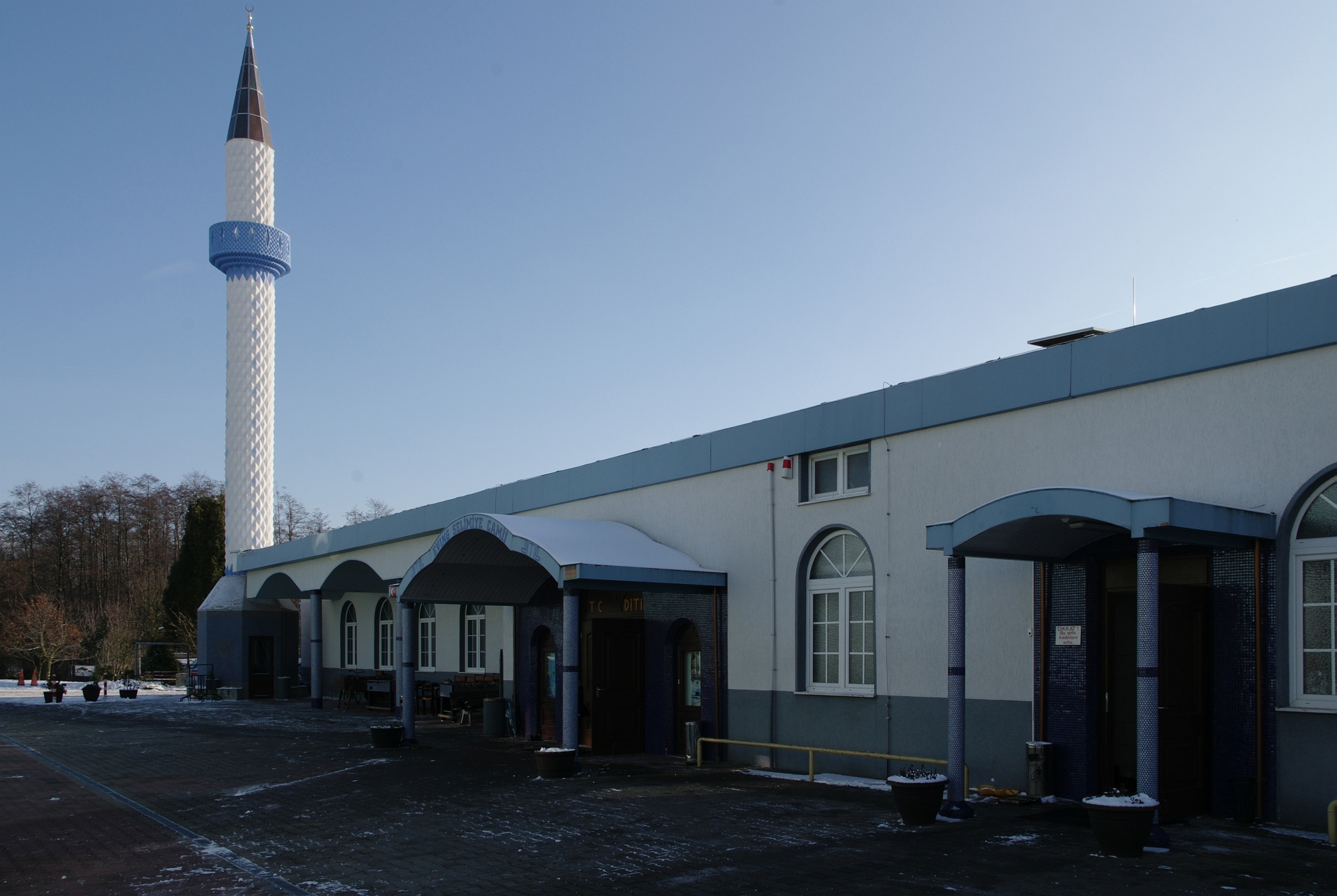 Selimiye Camii Dortmund in Dortmund-Eving Eingangsbereich